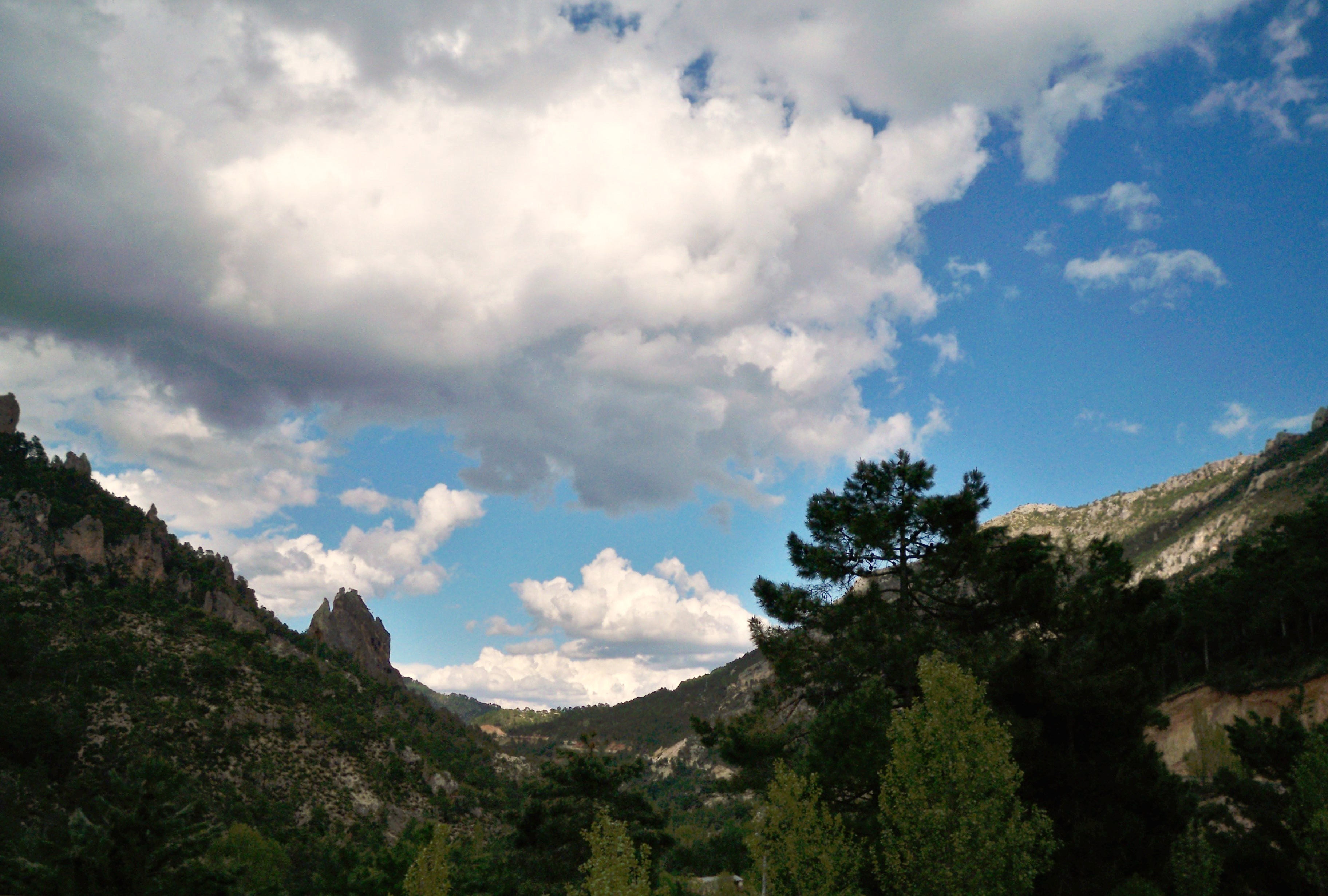 Vista del valle del río Mundo junto con las sierras del Segura en el municipio de Molinicos (Albacete)